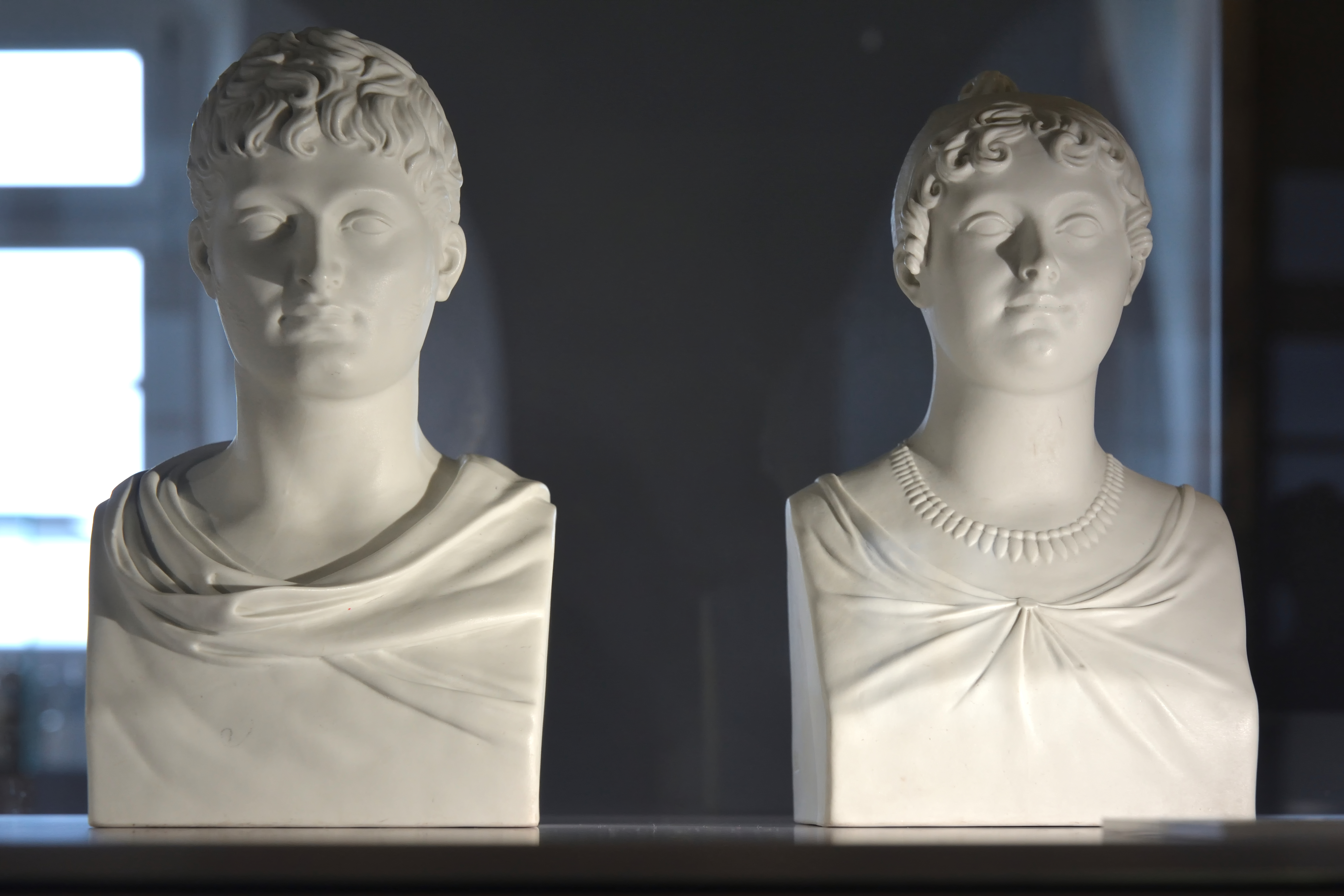 Impressionen vom Porzellanmuseum Schloss Fürstenberg Büsten von König Jérôme von Westfalen und seiner Ehefrau Katharina von Württemberg aus Biskuitporzellan, modelliert von Johann Christian Ruhl.